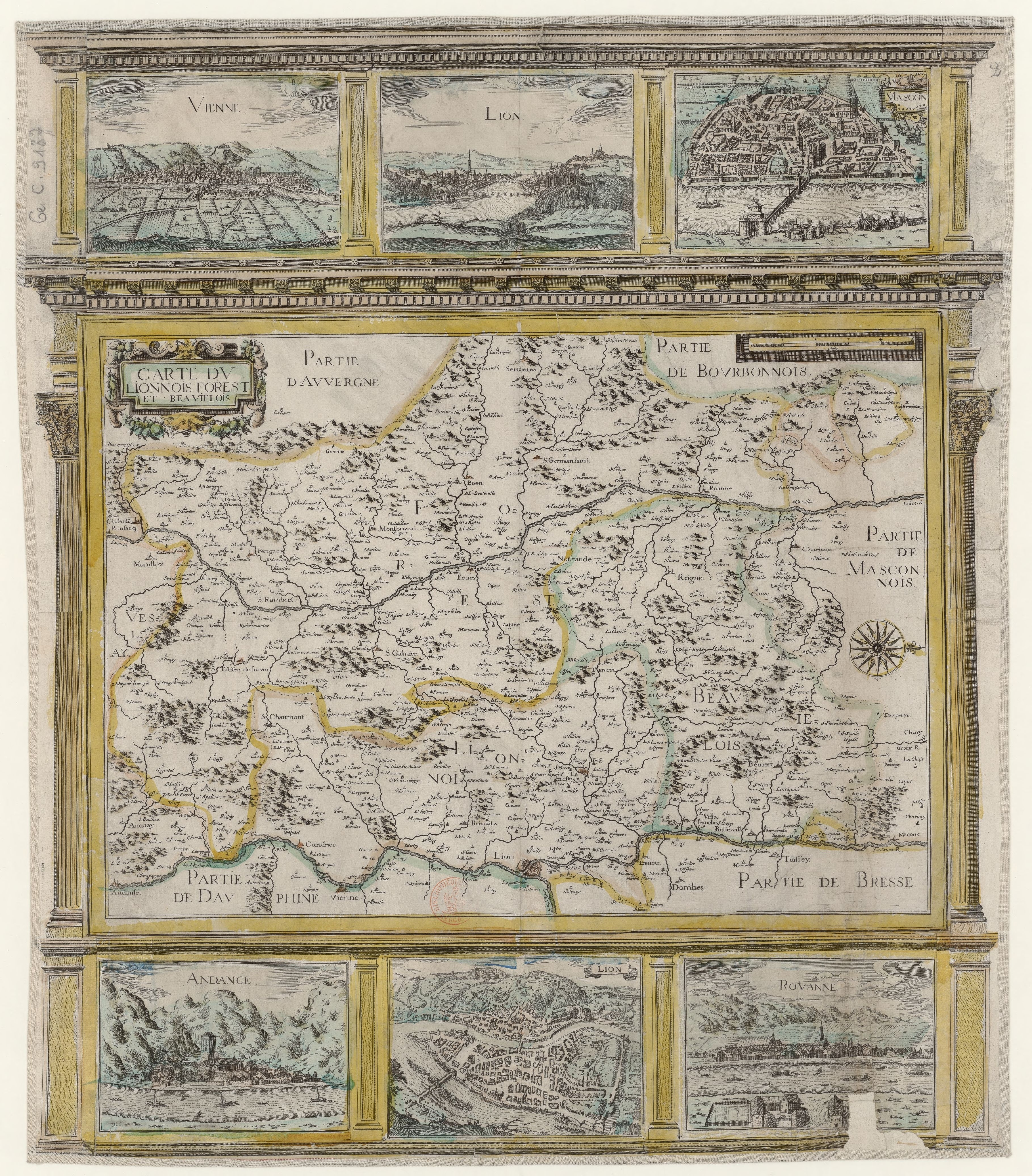 Carte du Lionnois, Forest et Beaujolois.